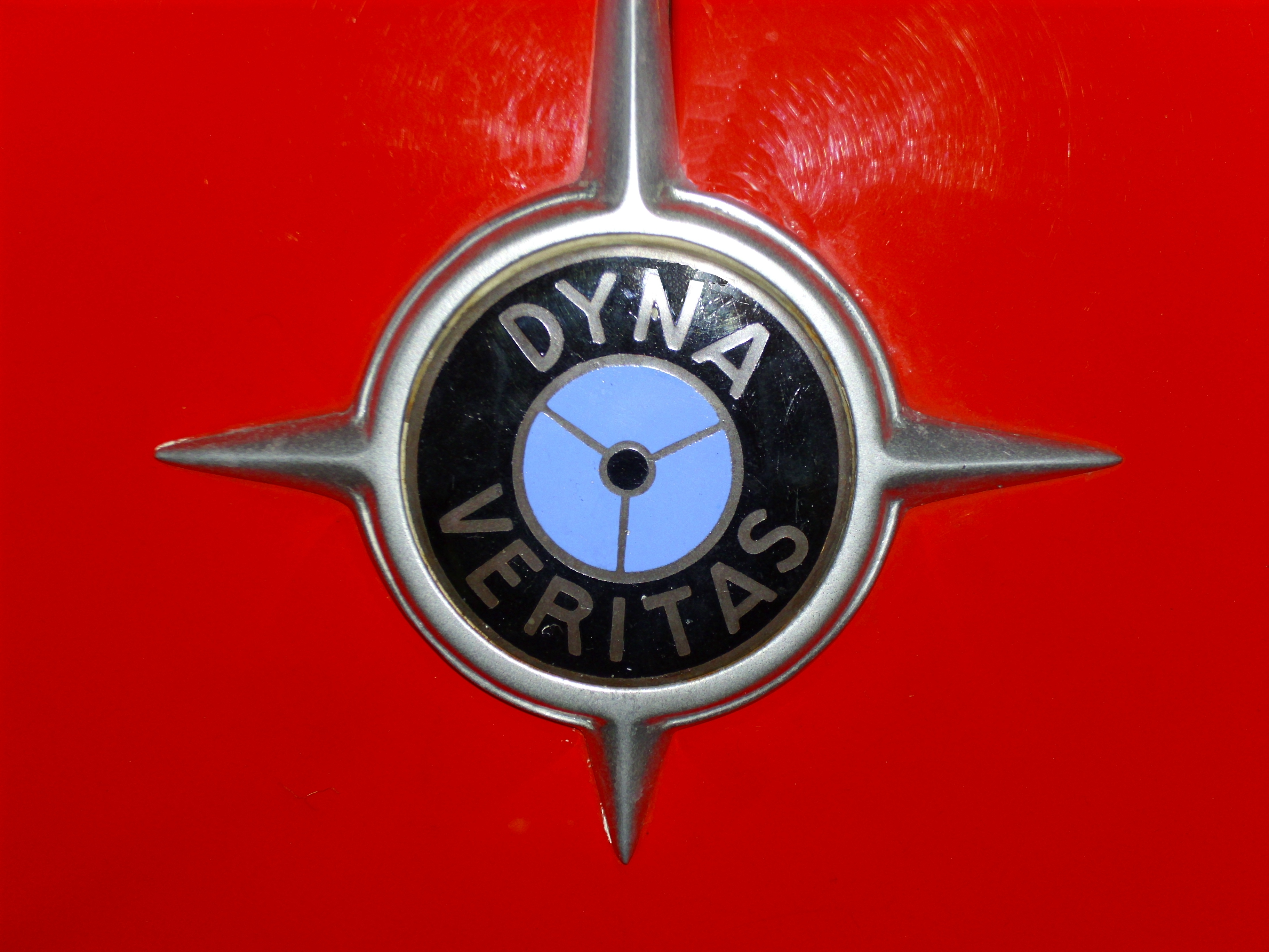 Emblem Dyna-Veritas